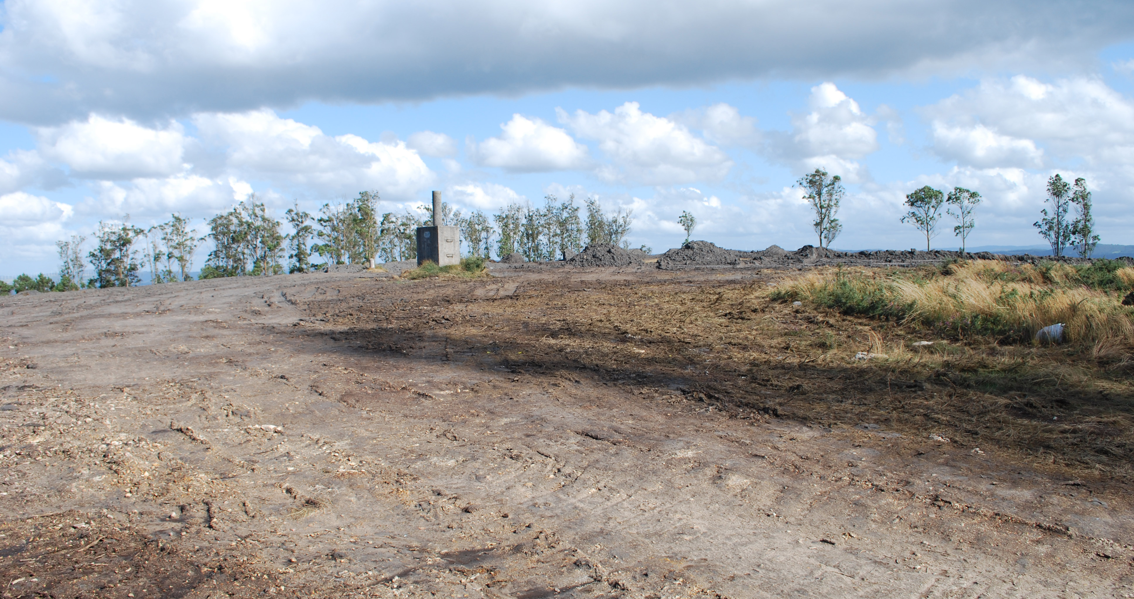 Cumio do Monte de Nenos cuberto de lixo industrial